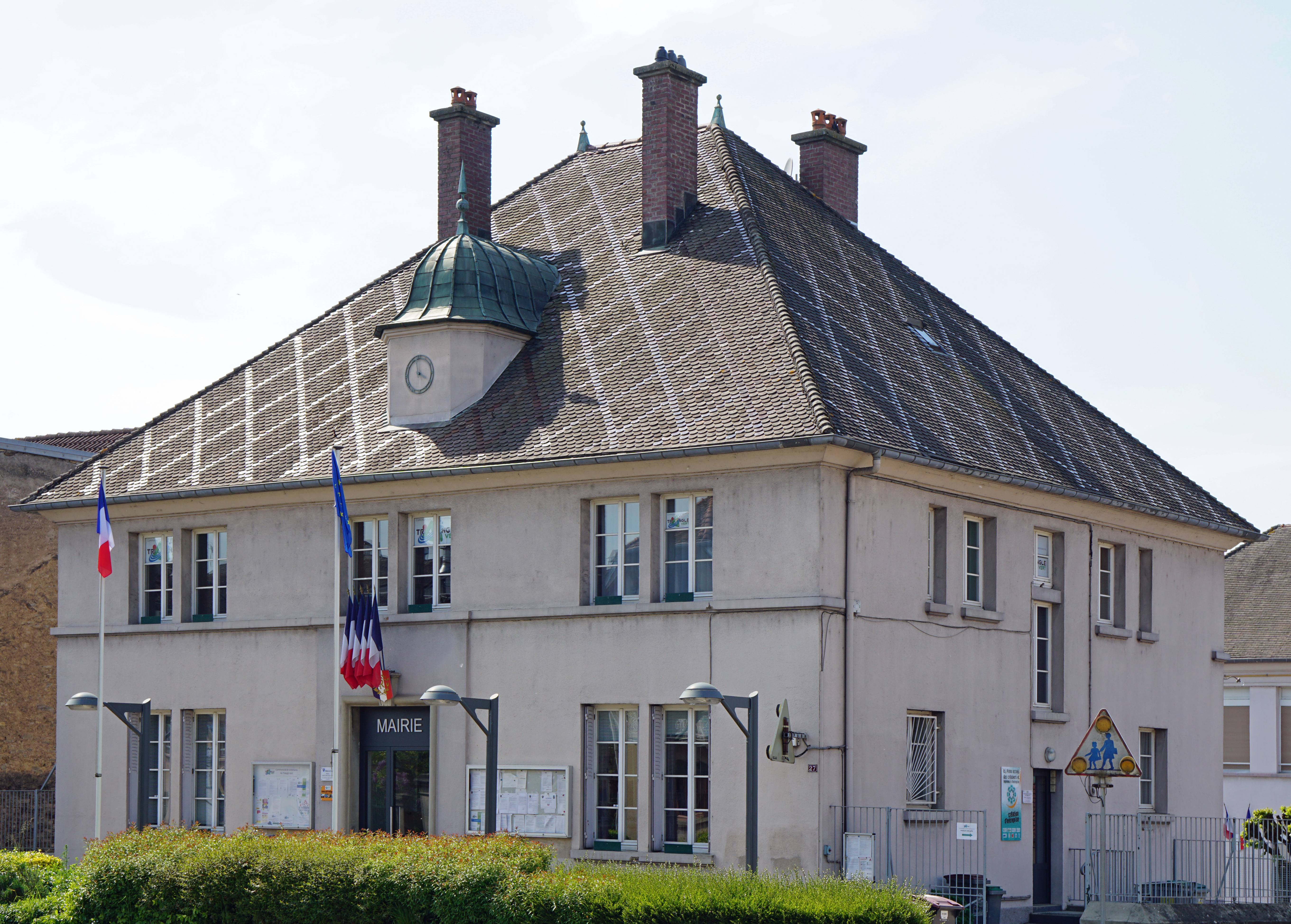 Mairie de Saulx (Haute-Saône).